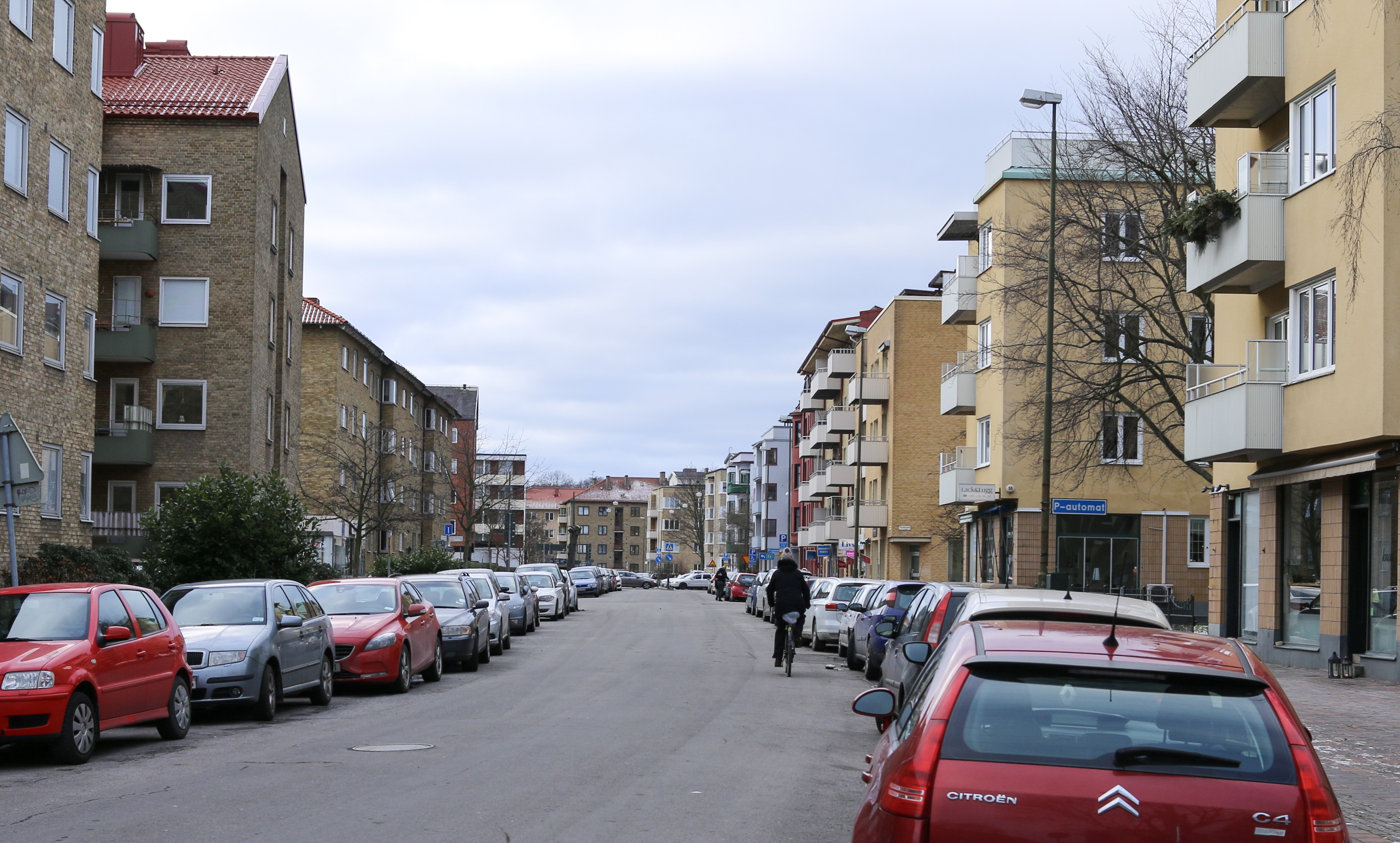 Västra Rönneholmsvägen, Malmö